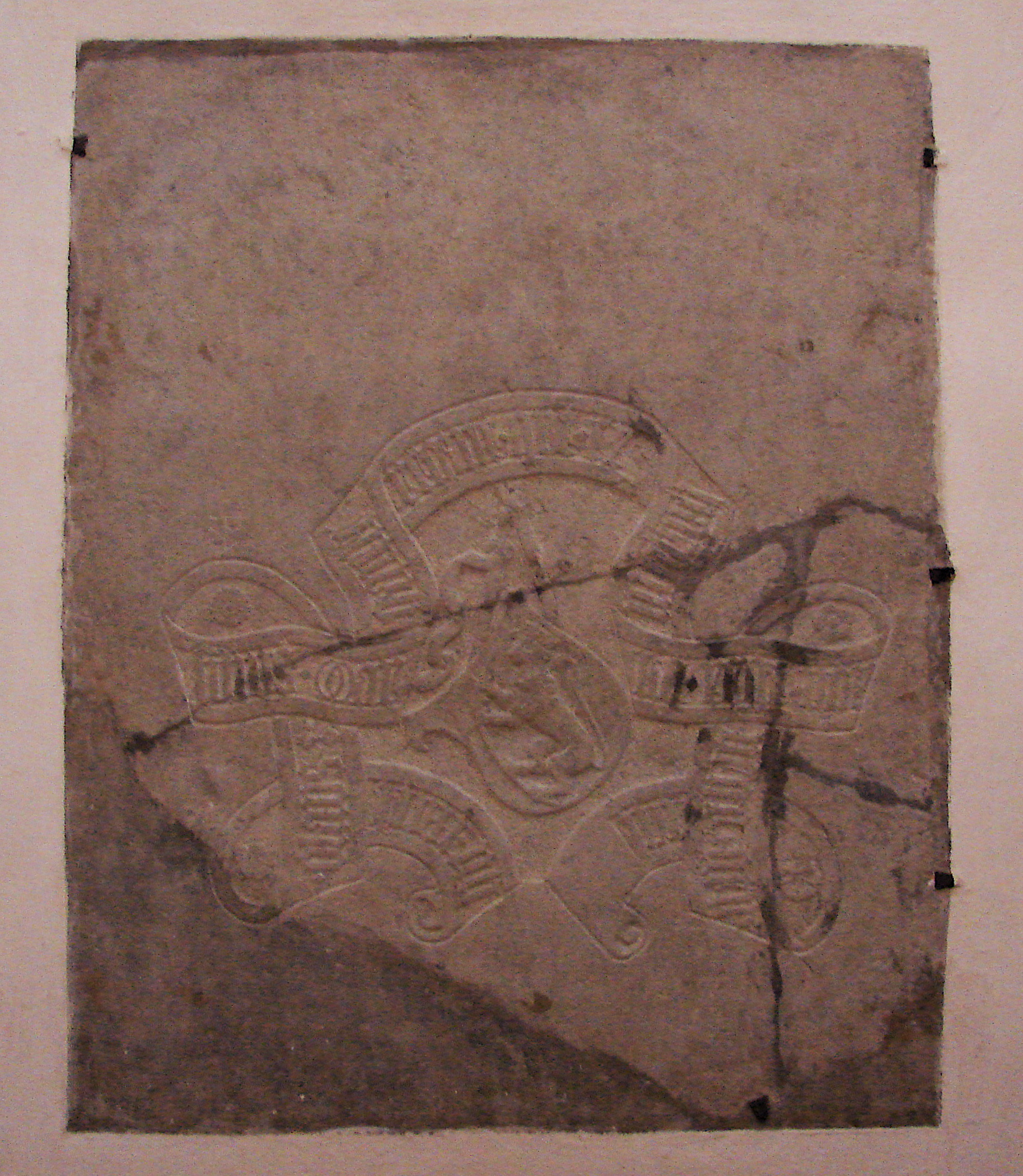 Sorø klosterkirke, Olav IV, Oluf 2, Olof av Danmark och Norge